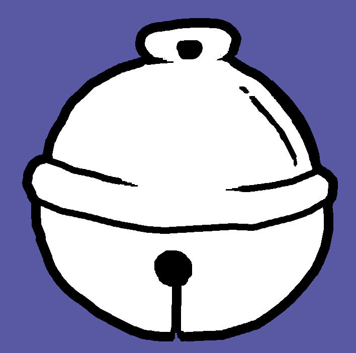 Titre: clochette (heraldique) réalisé pour le Projet, Blasons de Wikipédia Source: Dessinée par Ʀinaldum a partir de l'Armorial général de France, dressé en vertu de l'édit de 1696 de Charles d'Hozier. Licence: Ʀinaldum Créative C. catégorie:meuble héraldique